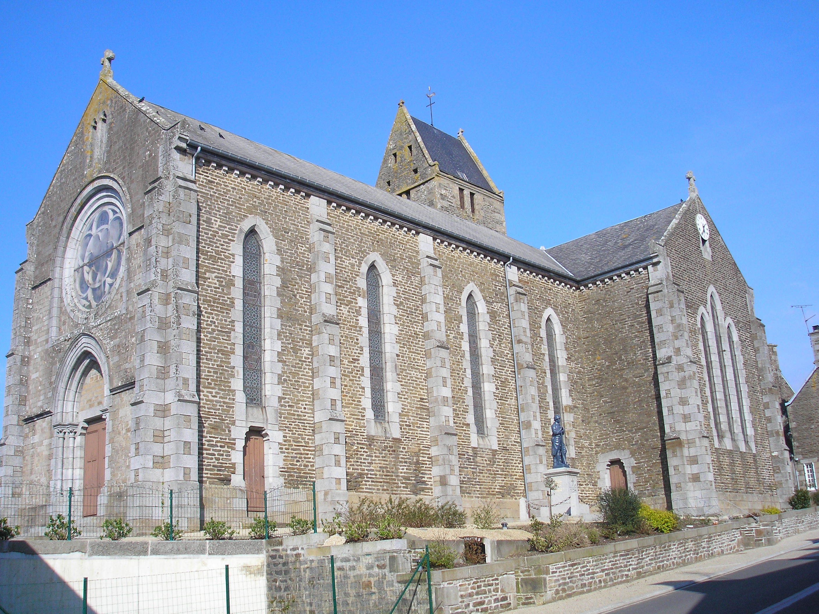 Saint-Laurent-de-Cuves (Normandie, France). L'église.